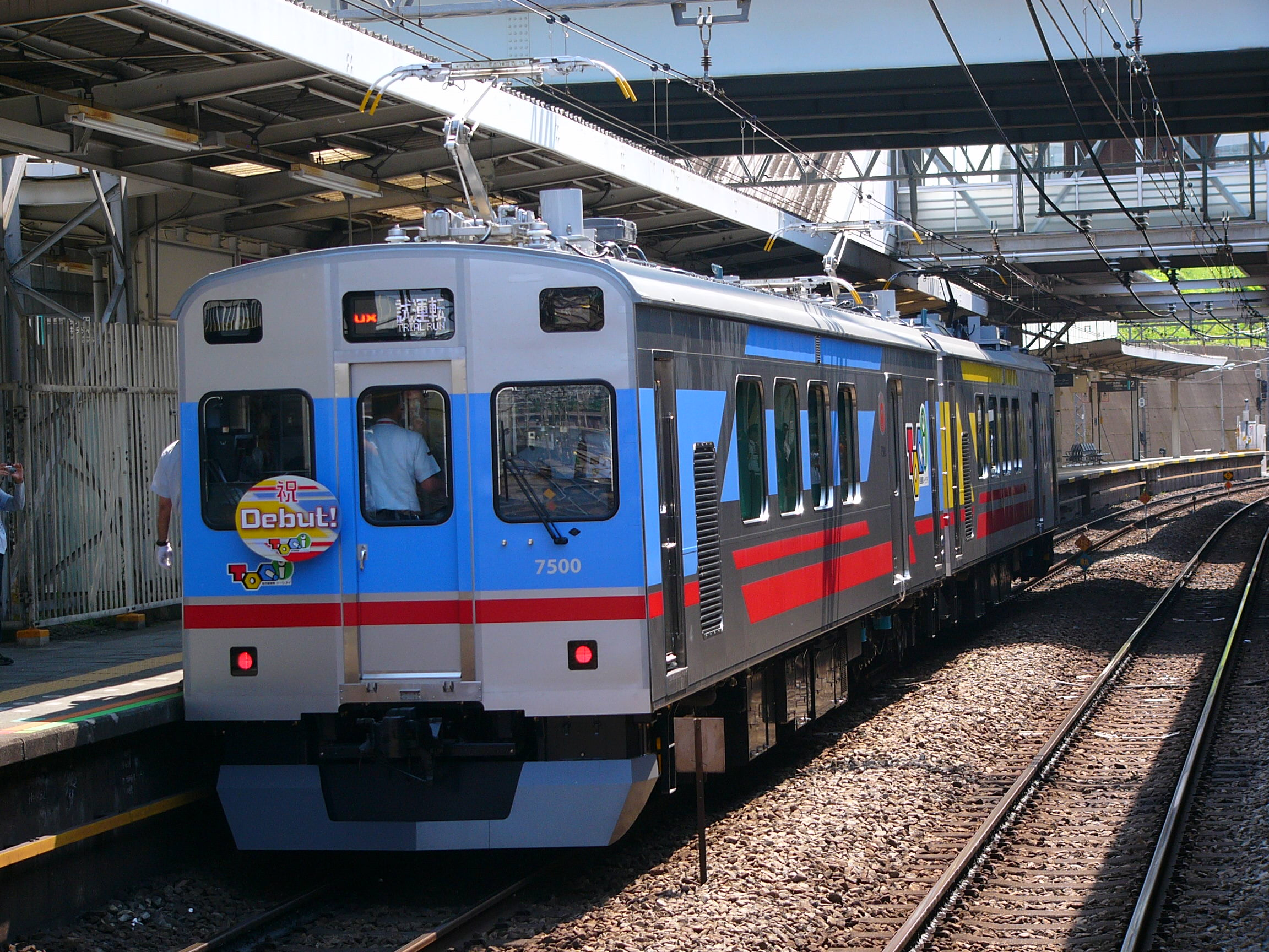 2012年5月6日 TOQ-ｉ公開試運転時 鷺沼駅